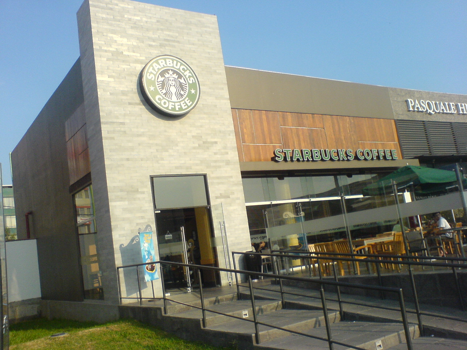 Starbucks ubicado en el Distrito de San Miguel Lima Peru frente al hipermercado Tottus